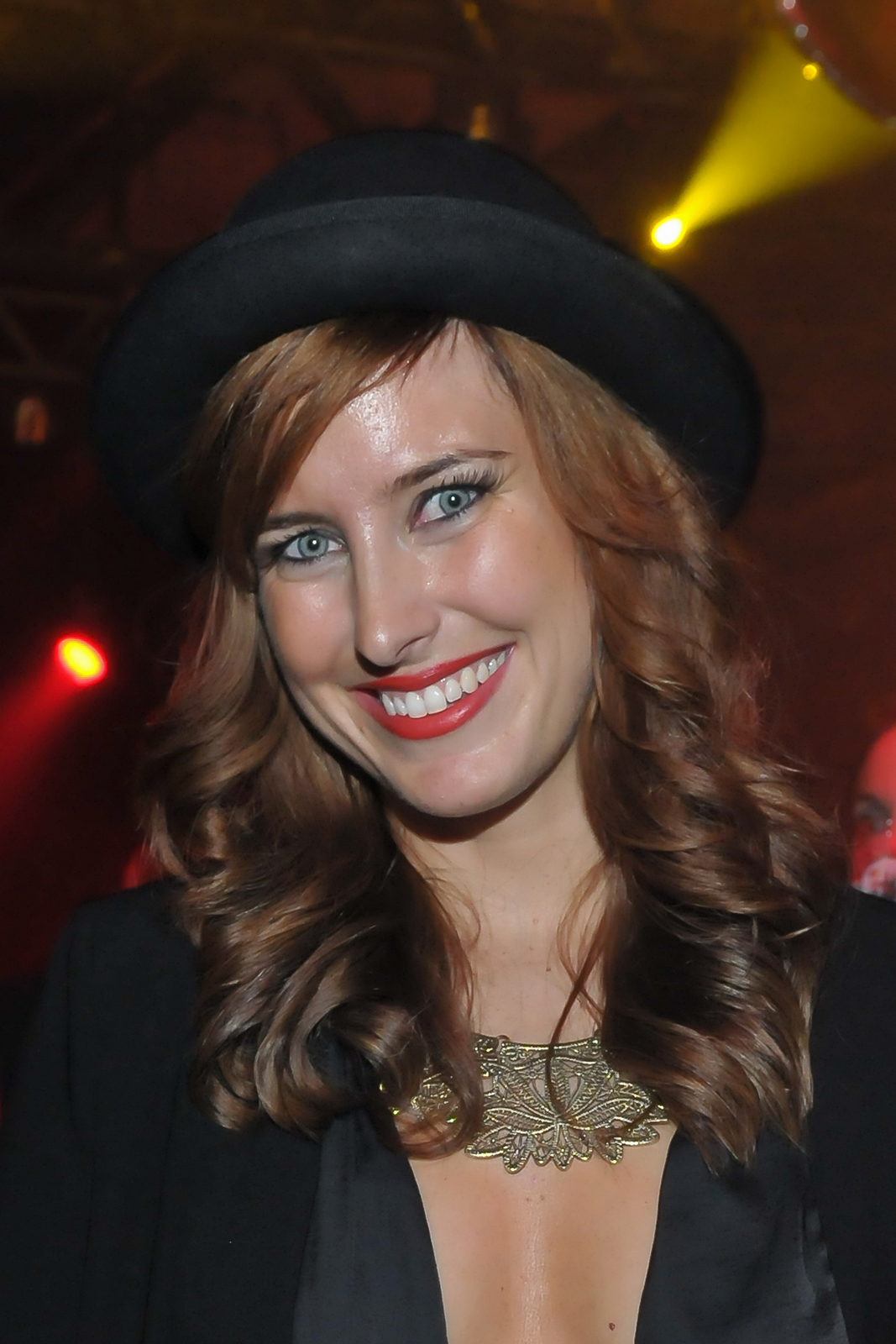 Ramona Stöckli auf dem Deutschen Comedypreis in Köln am 15. Oktober 2013.